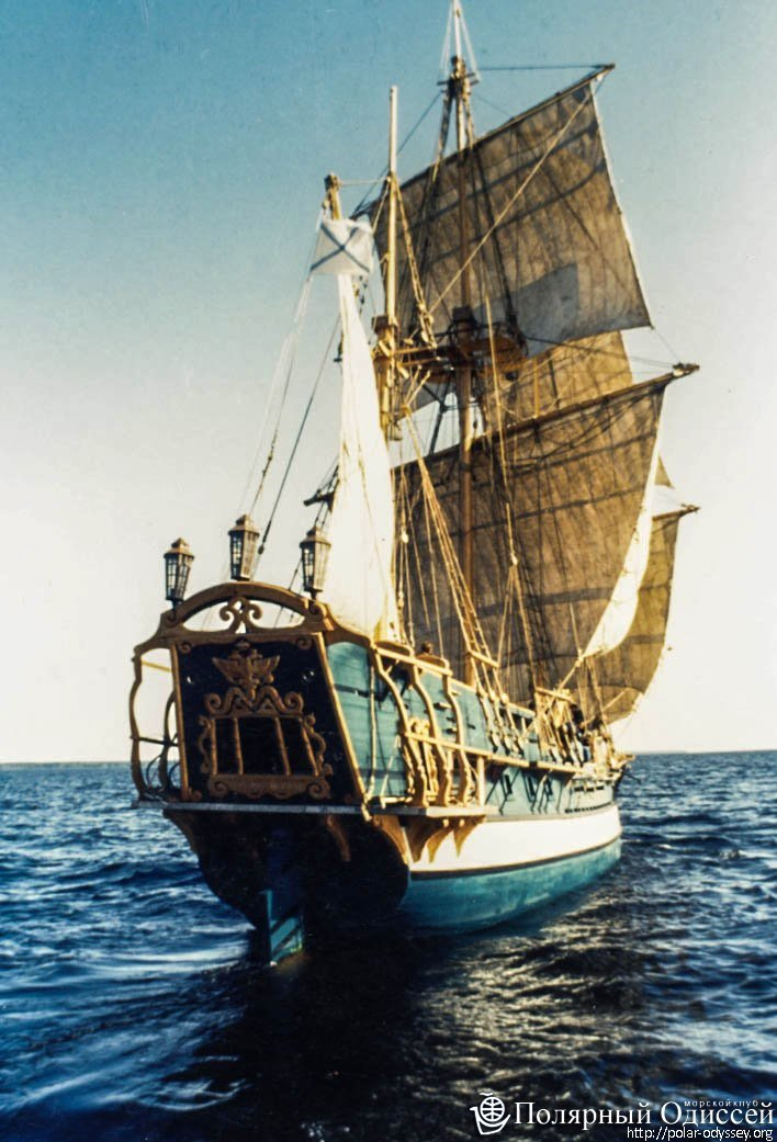 Реплика фрегата XVIII века (клуб "Полярный Одиссей", Петрозаводск, фрегат "Святой Дух")